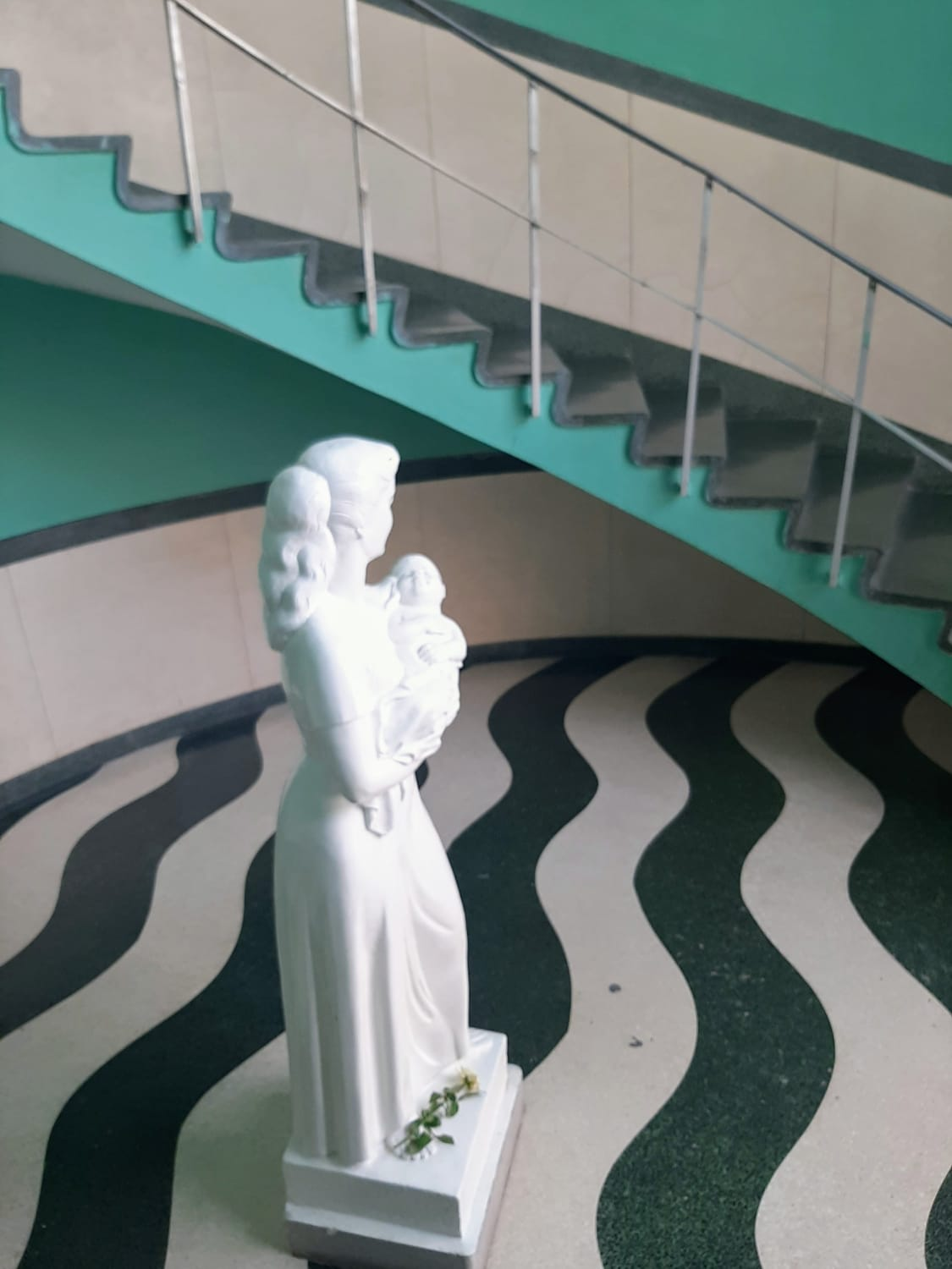 Escultura de maternidad, vista lateral. Hospital Materno Infantíl de Diez de Octubre, Hijas de Galicia, La Habana 2019.